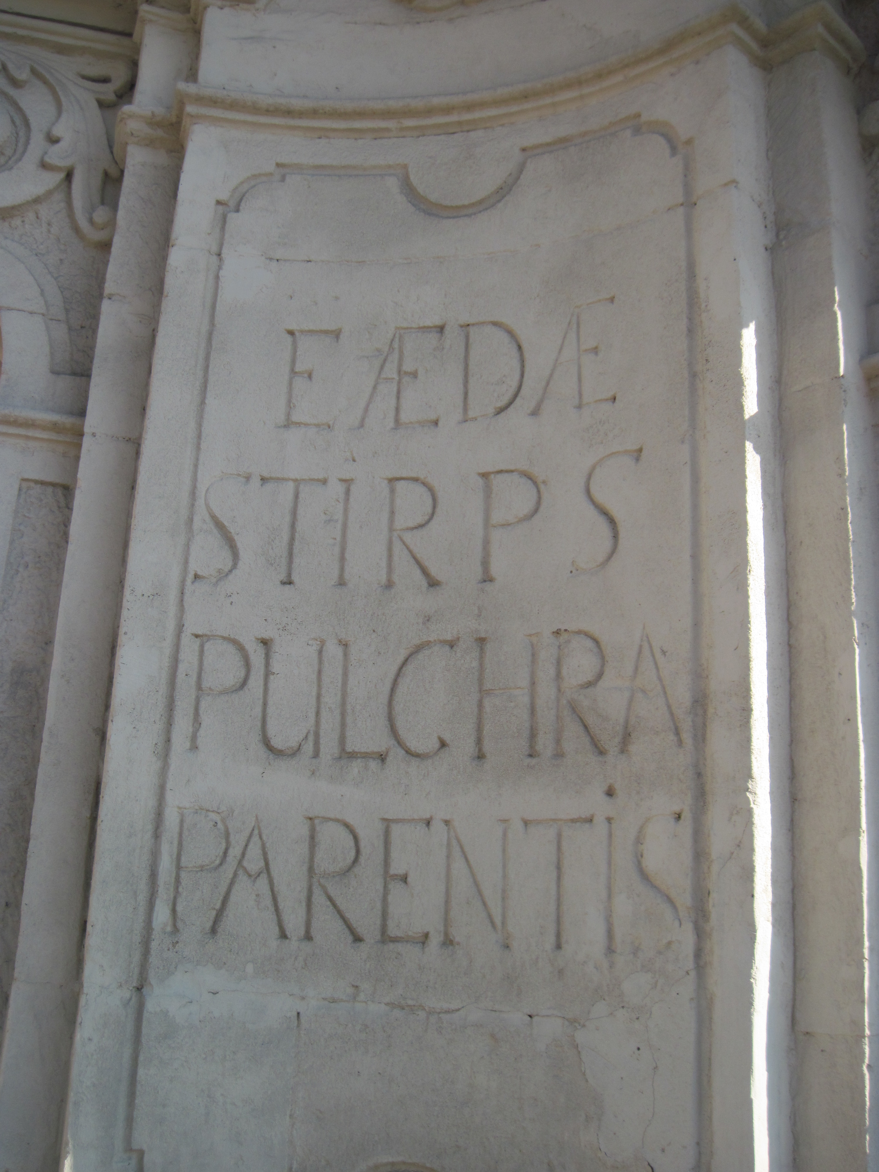 Статуя ПДМ, Бучач, 2015